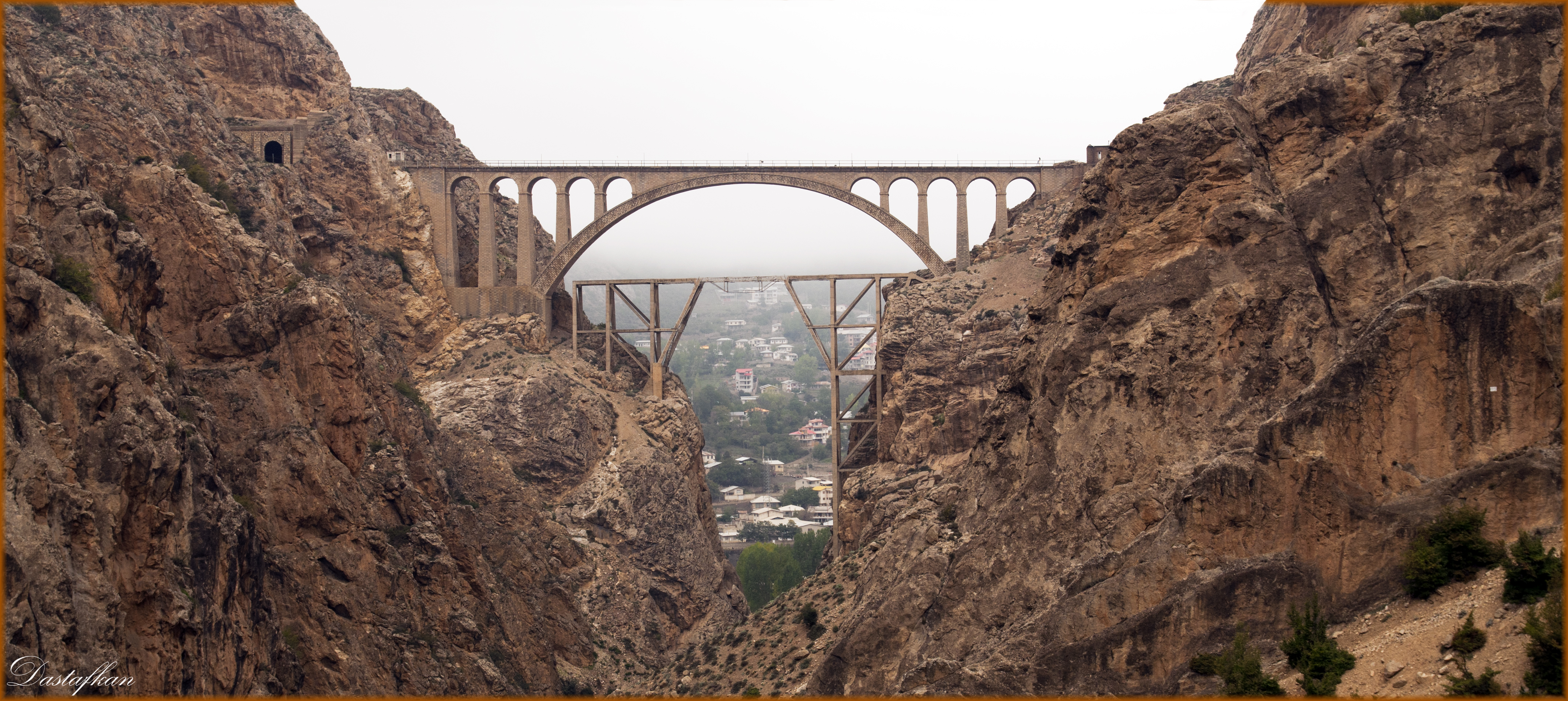 Veresk Bridge پل ورسک